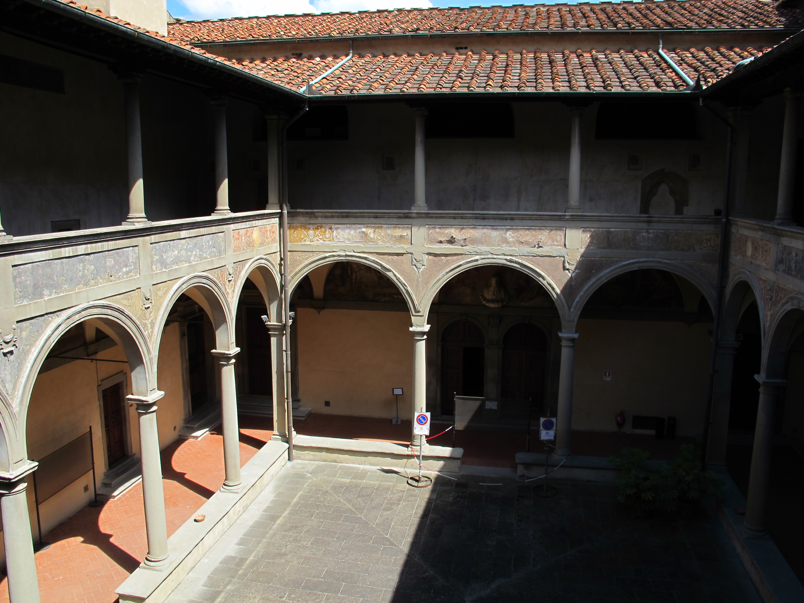 Chiostro degli Angeli, fi